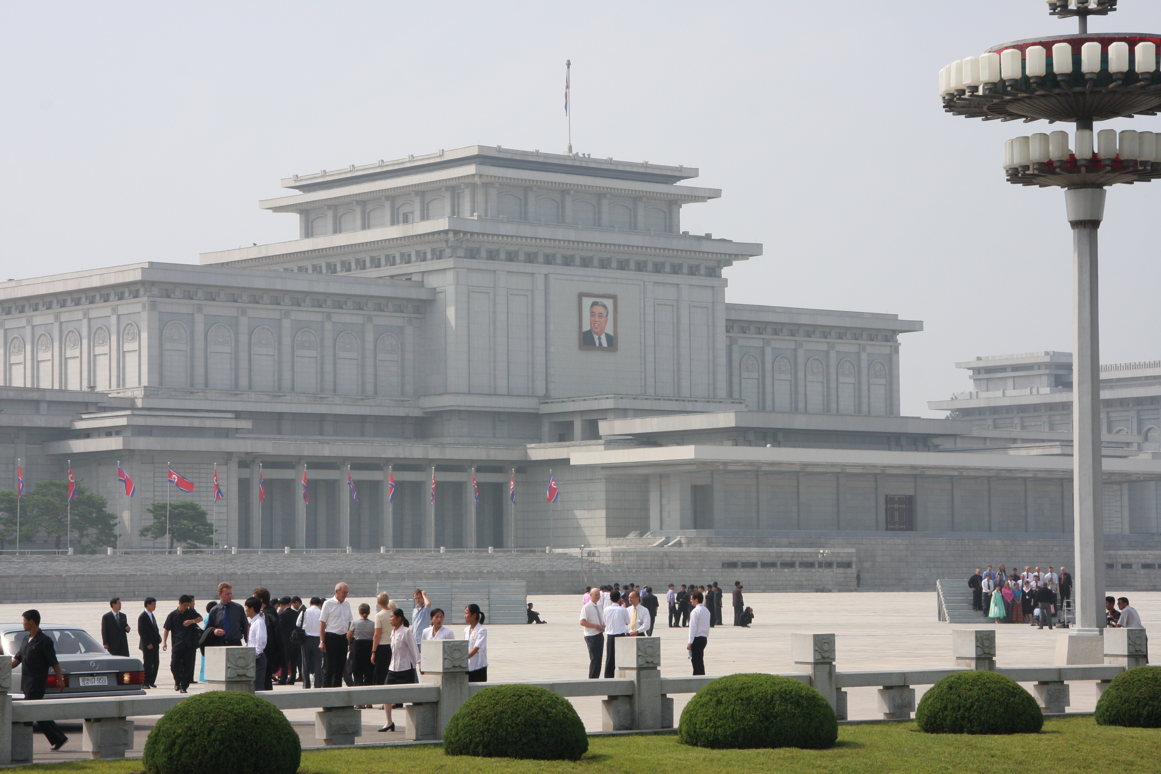 Kumsusan Memorial Palace